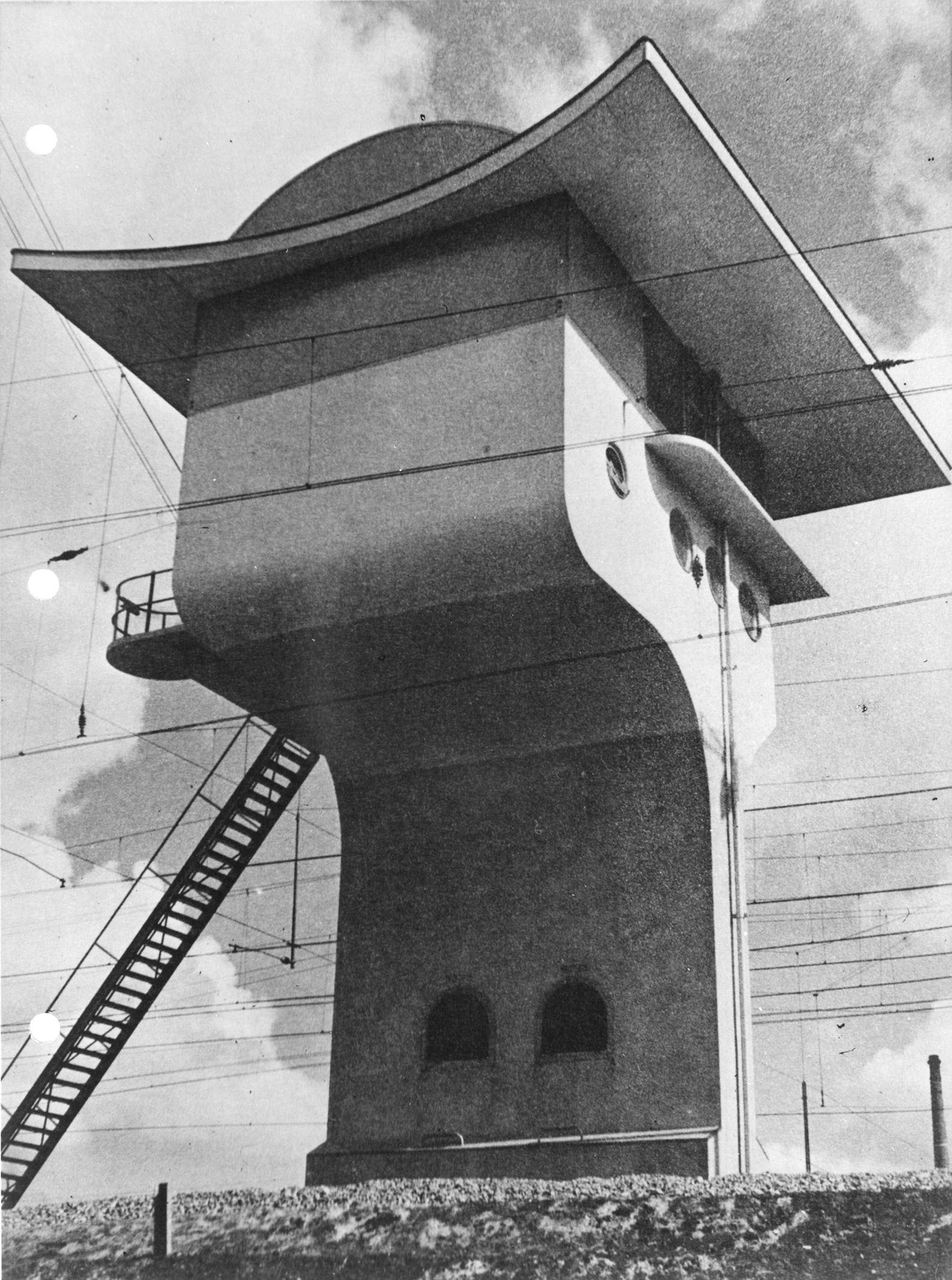 Seinhuisje uit circa 1938 bij de Leidseveertunnel in Utrecht. Afgebroken circa 1958 en nooit de funktie van seinhuisje uiteindelijk gehad. Ontwerper de bekende spoorarchitect Sybold van Ravesteyn.